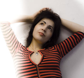 Алиса Якоби